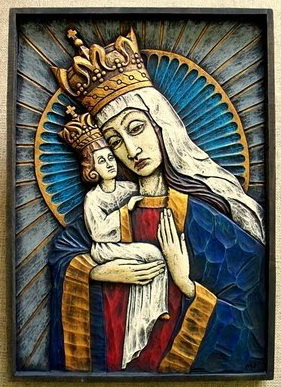 płaskorzeźba Matka Boża Kozielska, drewno lipowe, polichromia, 39x54 cm. Kopia wg projektu Tadeusza Zielińskiego-oryginał Londyn, kościół św. Andrzeja Boboli.